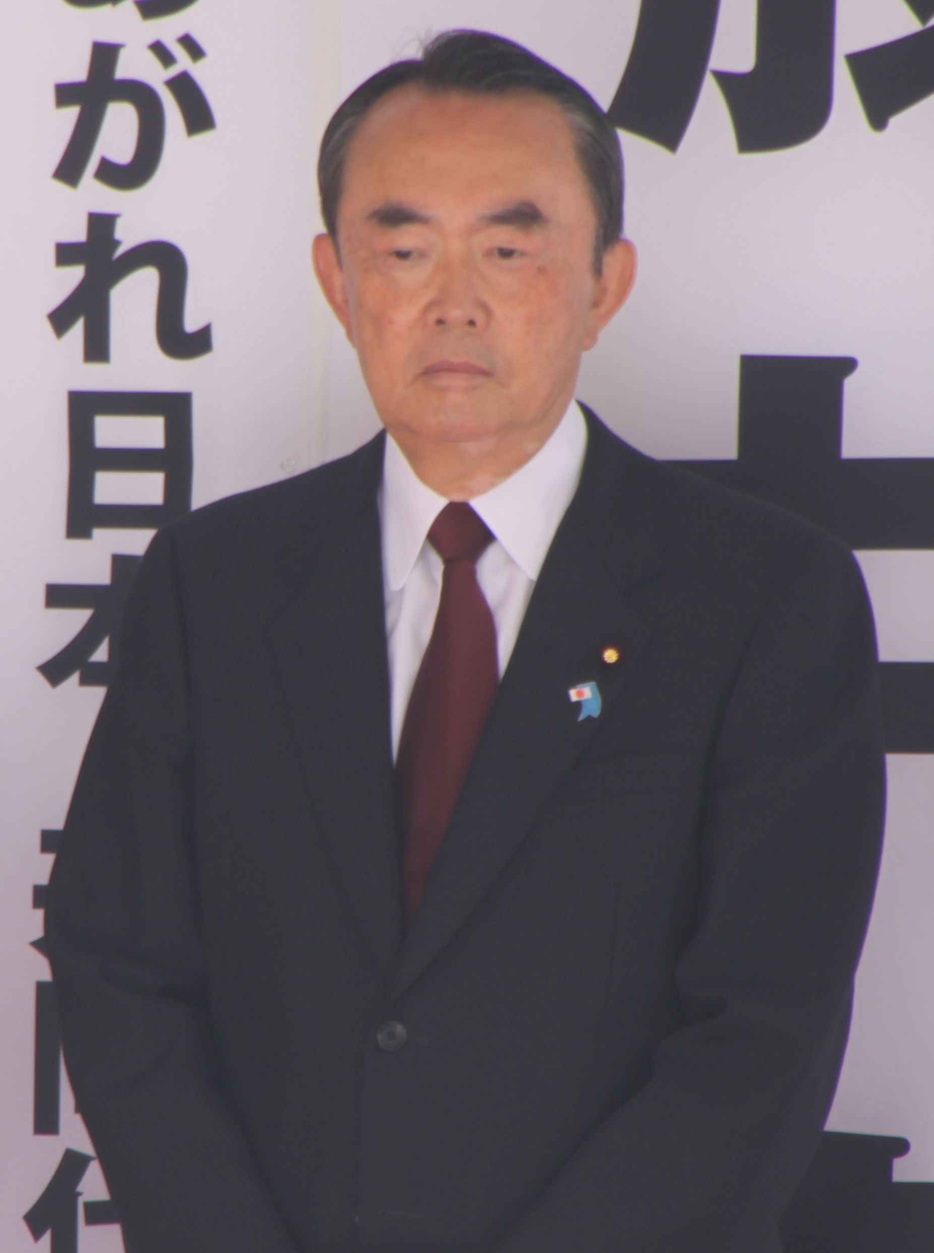 Takeo Hiranuma、平沼赳夫